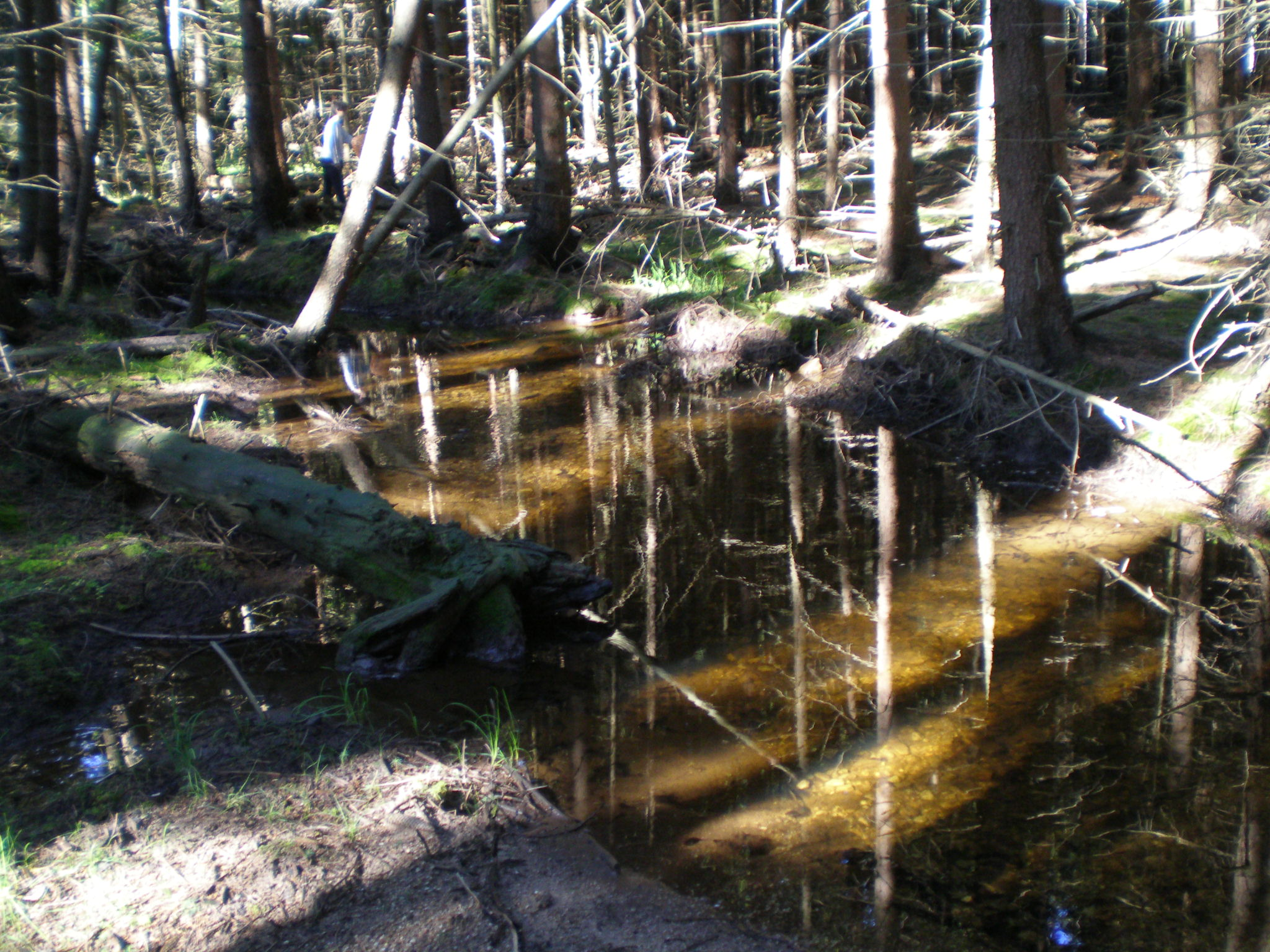 Litavka nad Lázskou nádrží, nedaleko svého pramene